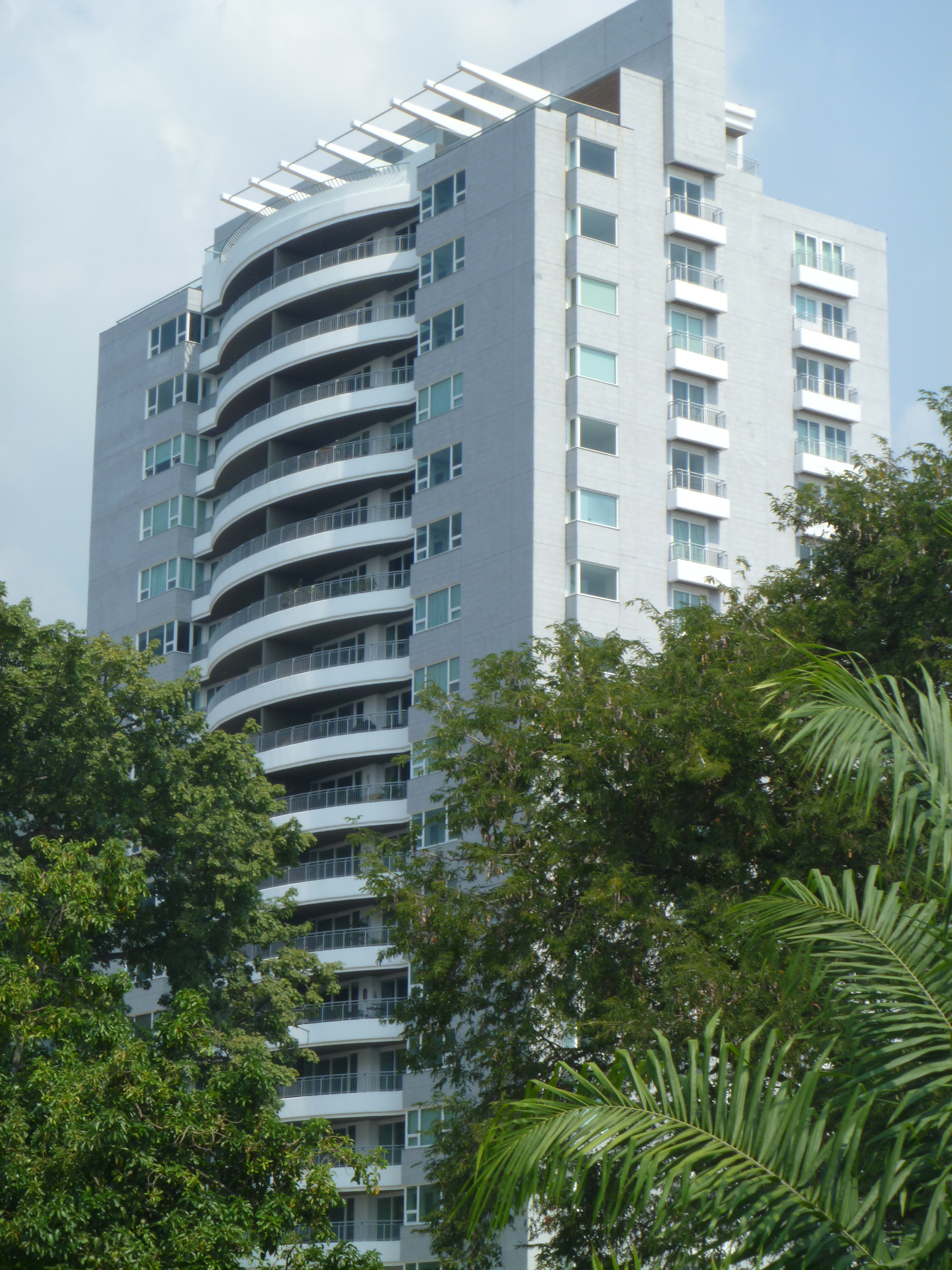 325 Rio de Piedras es uno de los cinco edificios mas altos de san pedro